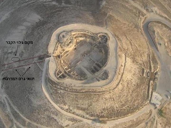 סימון מקום מציאת קבר הורדוס רישיון נוצר על ידי משתמש:עמית אבידן